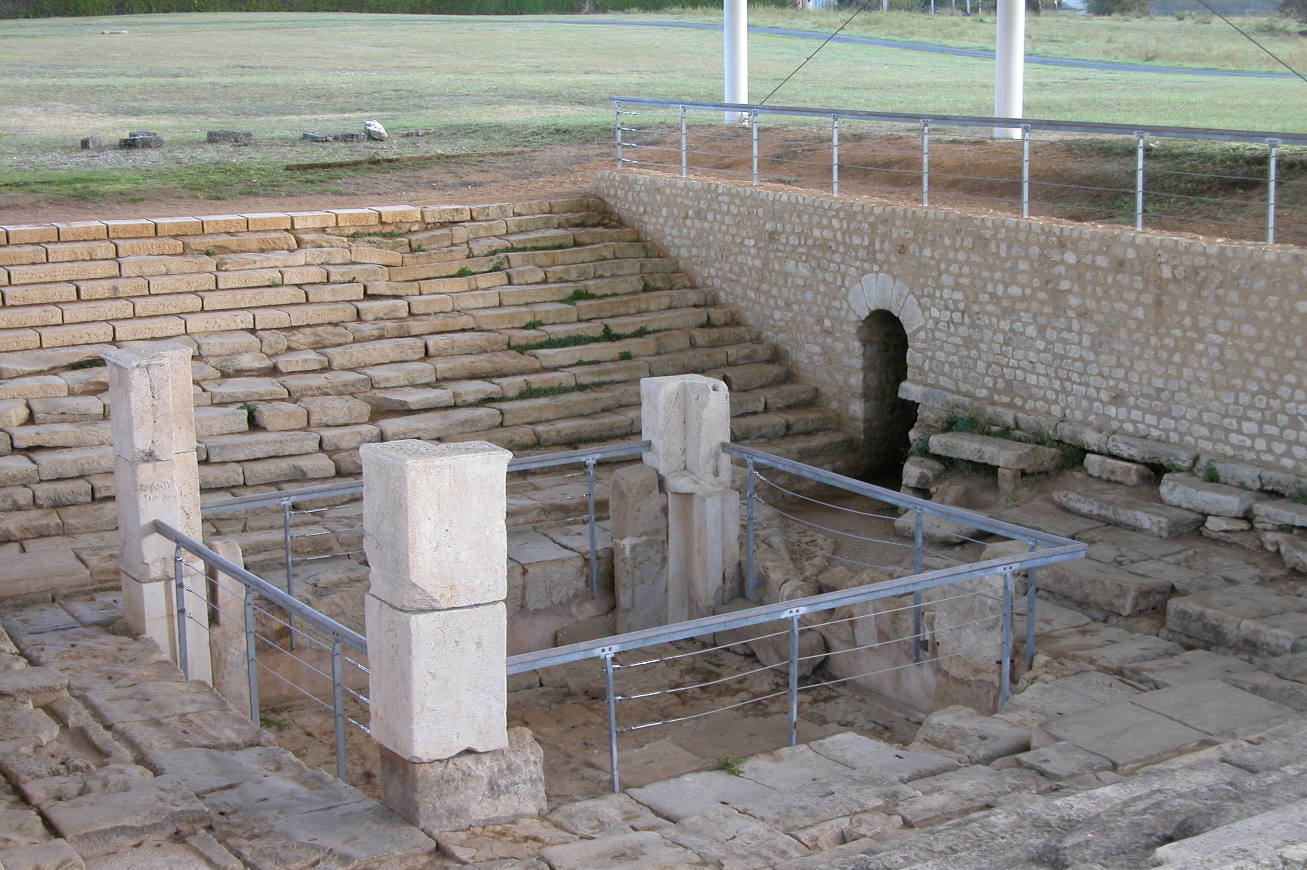 Fontaine Gallo-romaine Argentomagus Saint-Marcel (Indre)